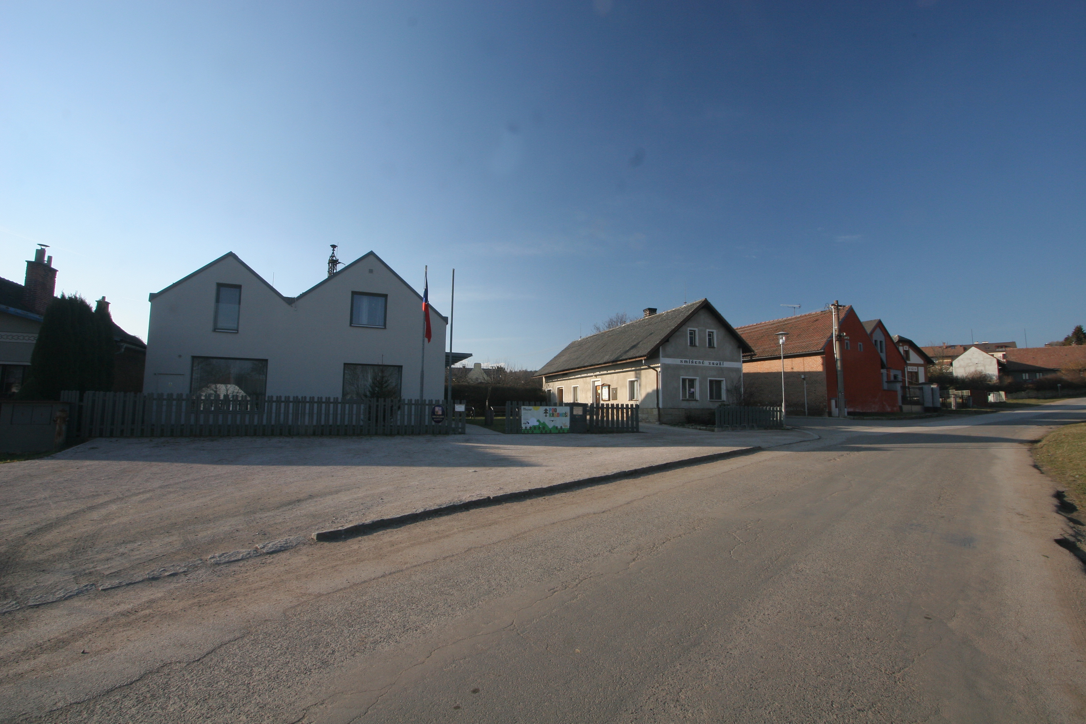 Holovousy obecní úřad